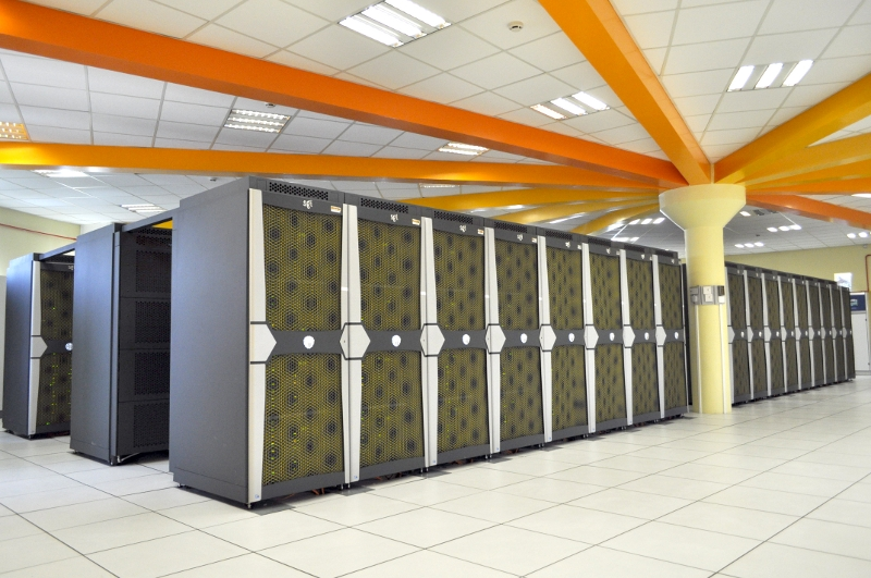 Machine Jade, superordinateur basé au CINES, Montpellier, France.